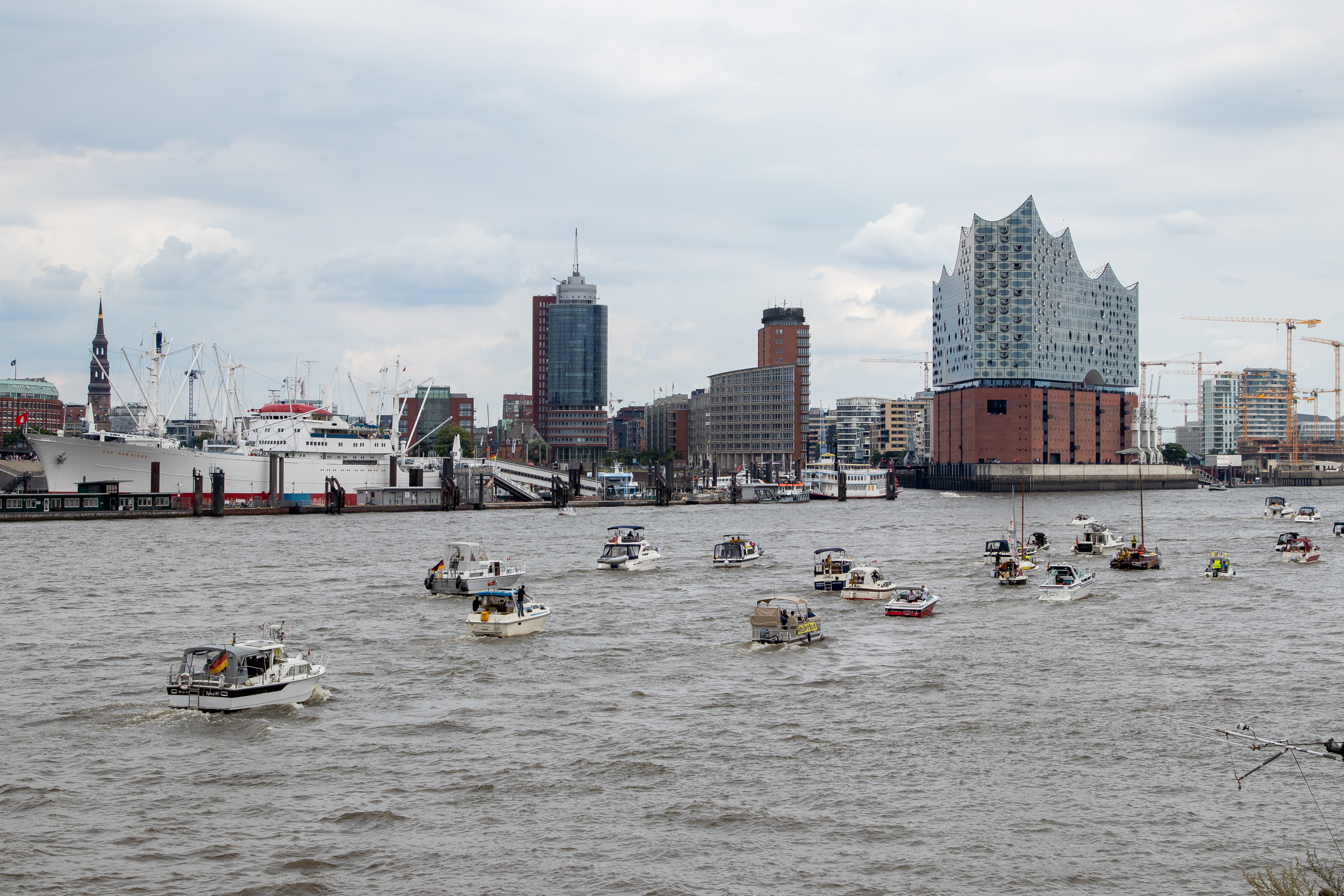 Schiffsdemonstration gegen den Tidenanschluss der Dove Elbe vor den St. Pauli-Landungsbrücken am 25.07.2020